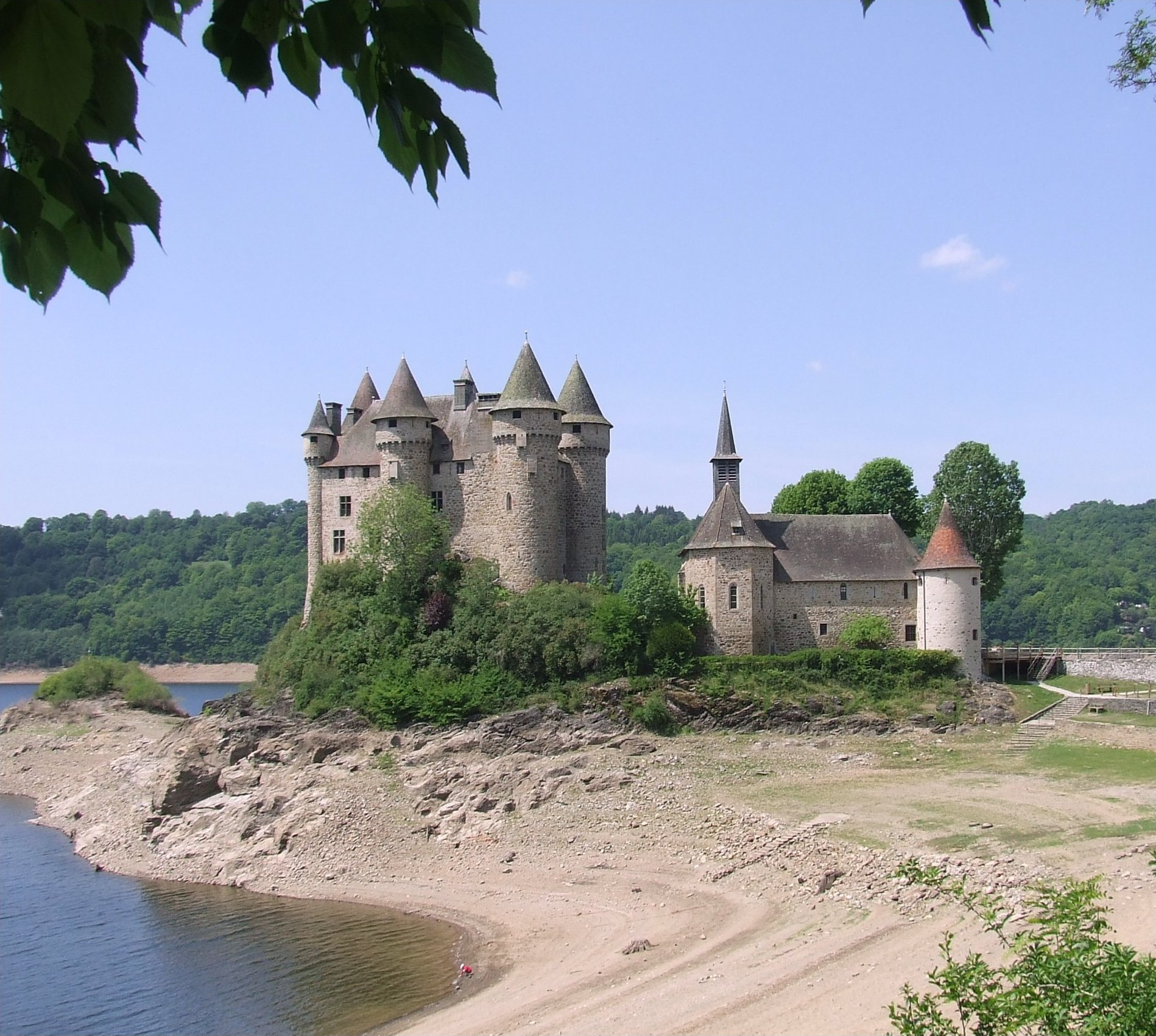 Le château de Val